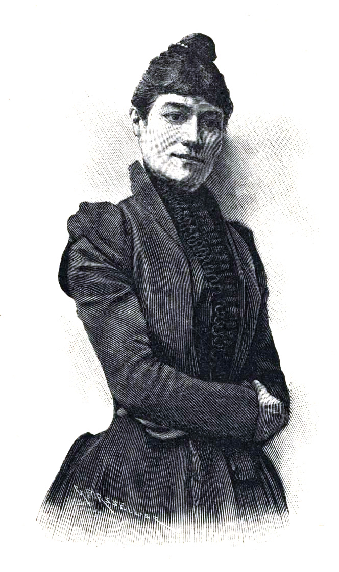 Julia Beck (1853-1935)